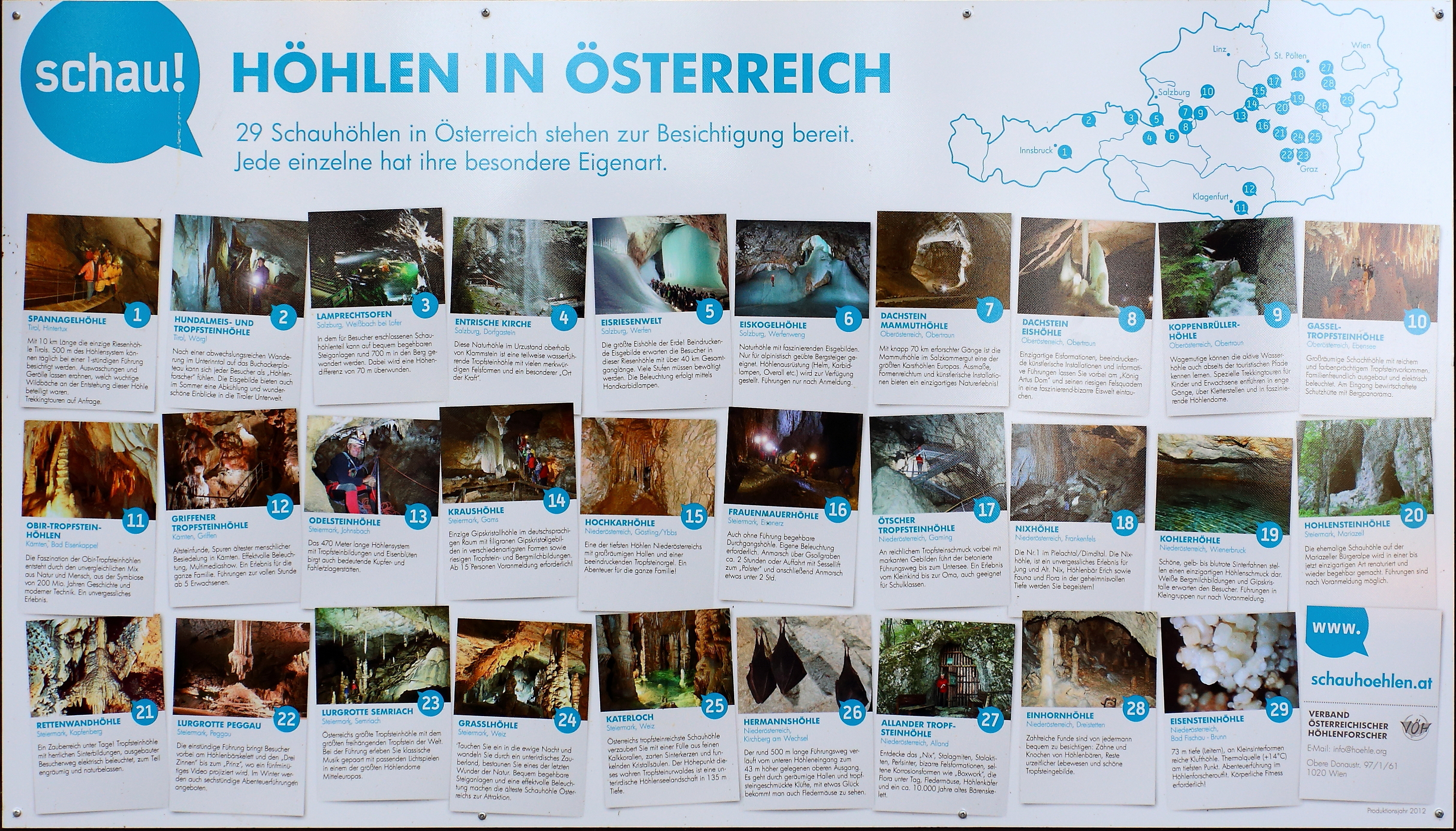 Übersichtskarte der österreichischen Schauhöhlen (Stand 2012) laut dem Verband der Österreichischen Höhlenforscher. Eine fix montierte und jederzeit öffentlich zugängliche Schautafel am Vorplatz der Eisensteinhöhle.